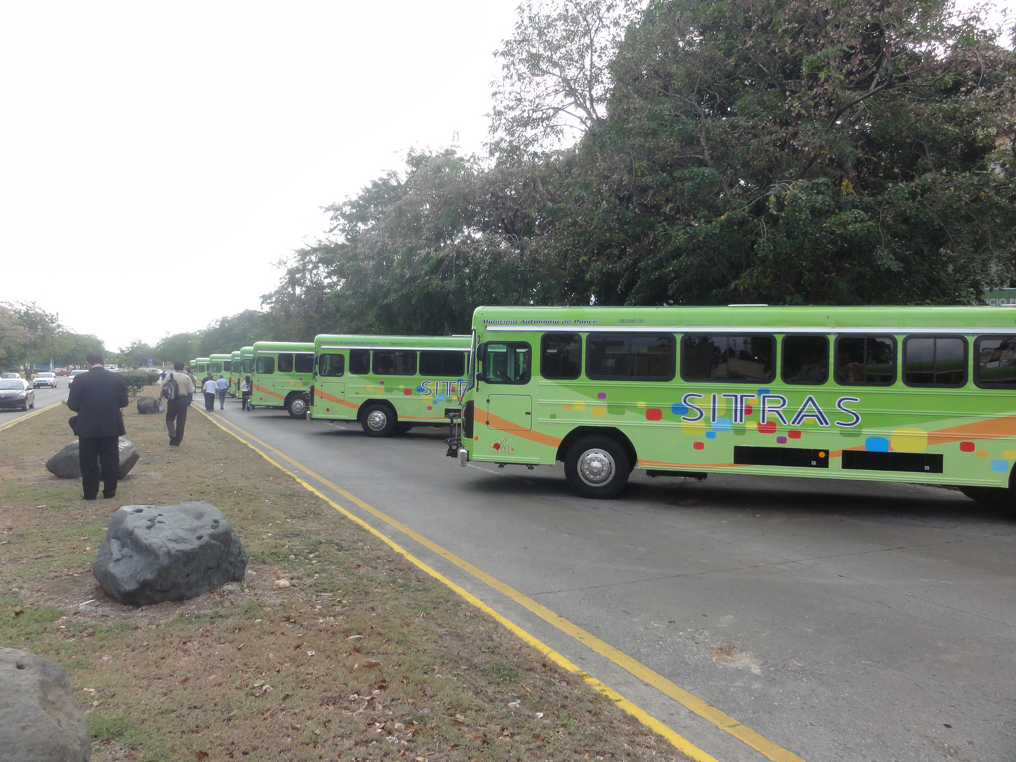 SITRAS Flotilla, Ponce, Puerto Rico